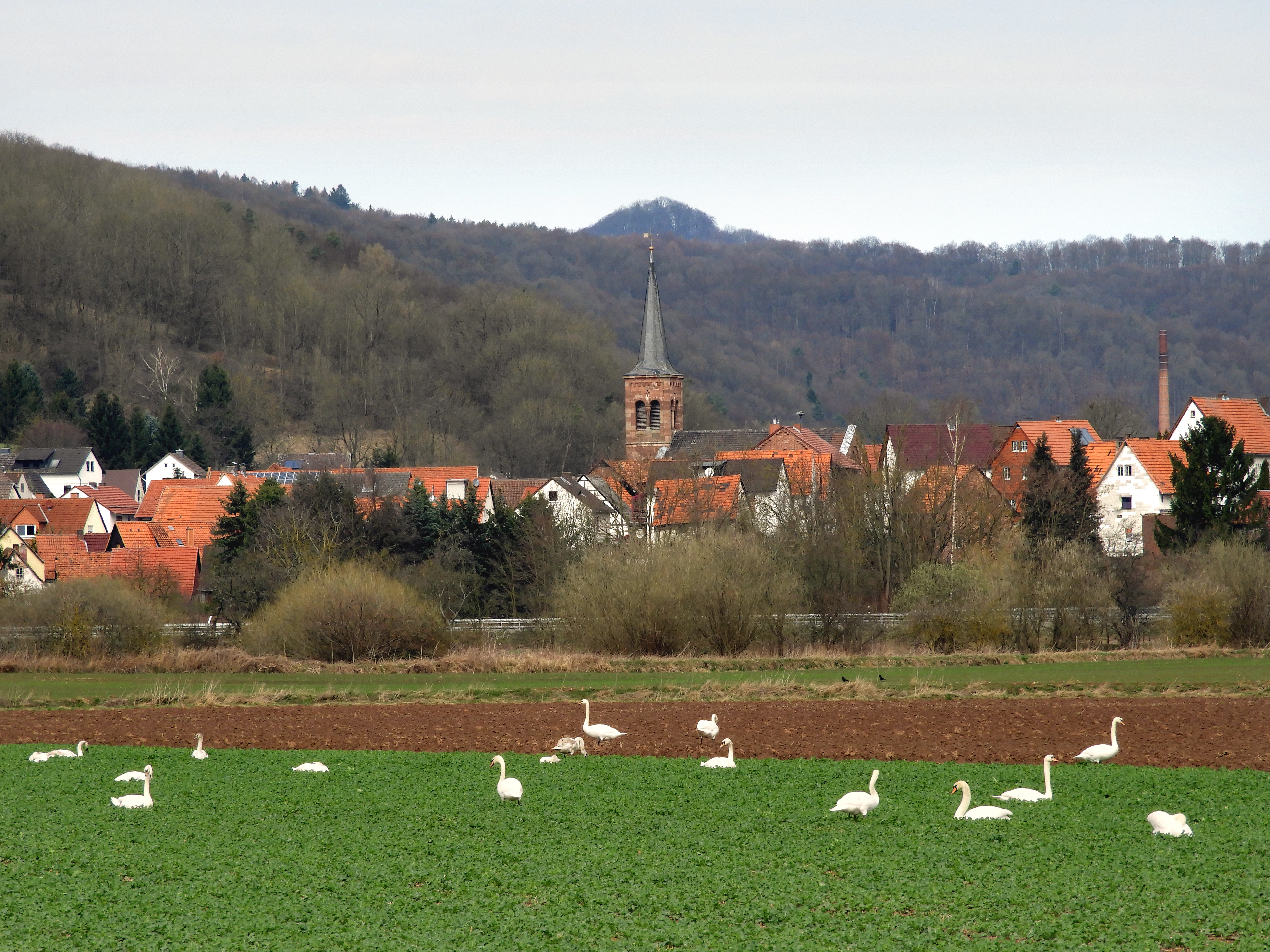 Blick von der Werraaue auf Frieda. In der Mitte der hohe Turm der im Jahr 1862 fertiggestellten Pfarrkirche. Der die Kirche umgebene historische Ortskern bildet, von einigen Störungen abgesehen, ein einheitliches Ensemble. Als Gesamtanlage gilt der Bereich aus künstlerischen und ortsgeschichtlichen Gründen als schützenswert.